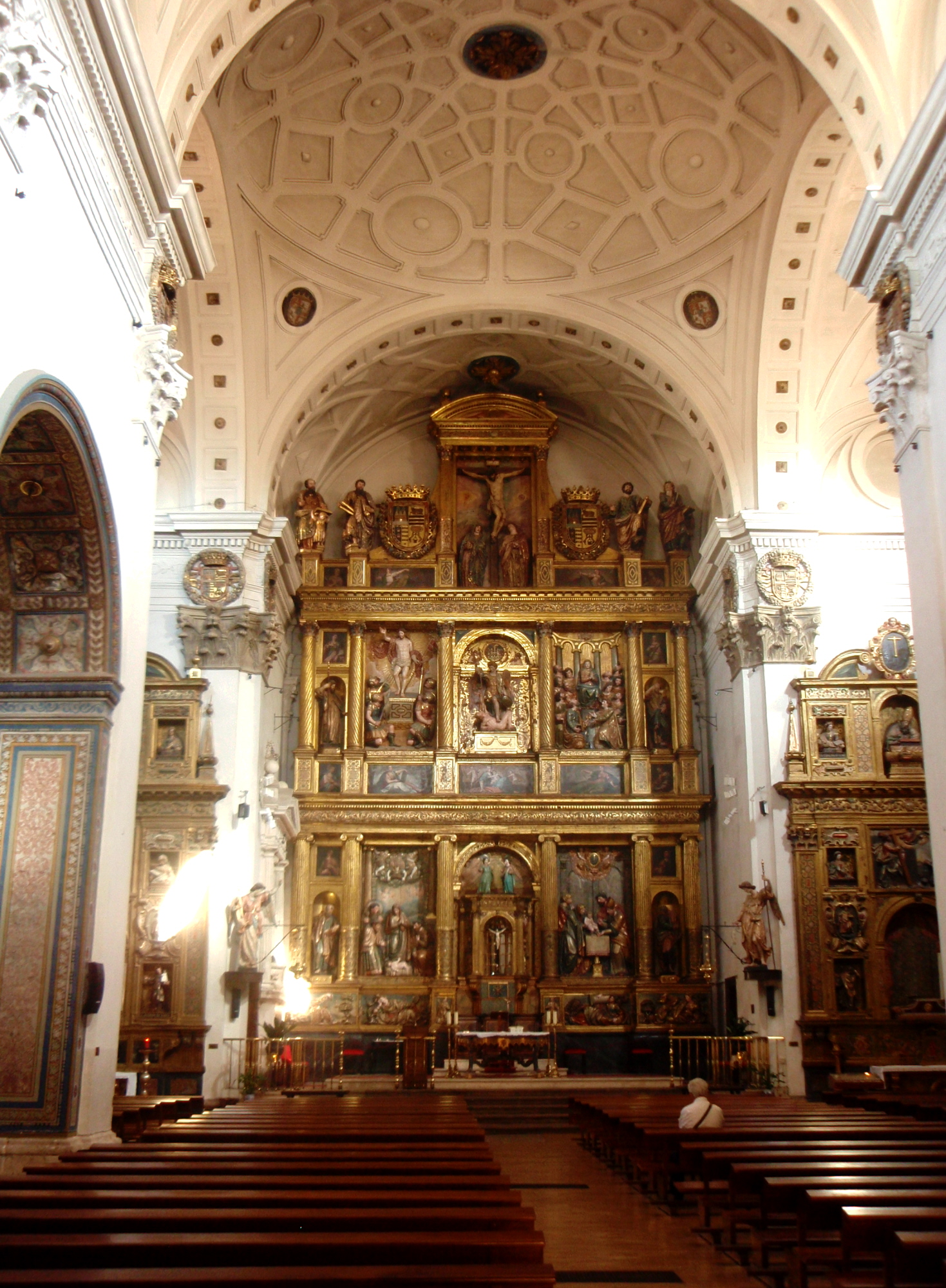 Interior de la iglesia de San Miguel (Valladolid, España) desde los pies. se observa el retablo mayor (siglo XVI)